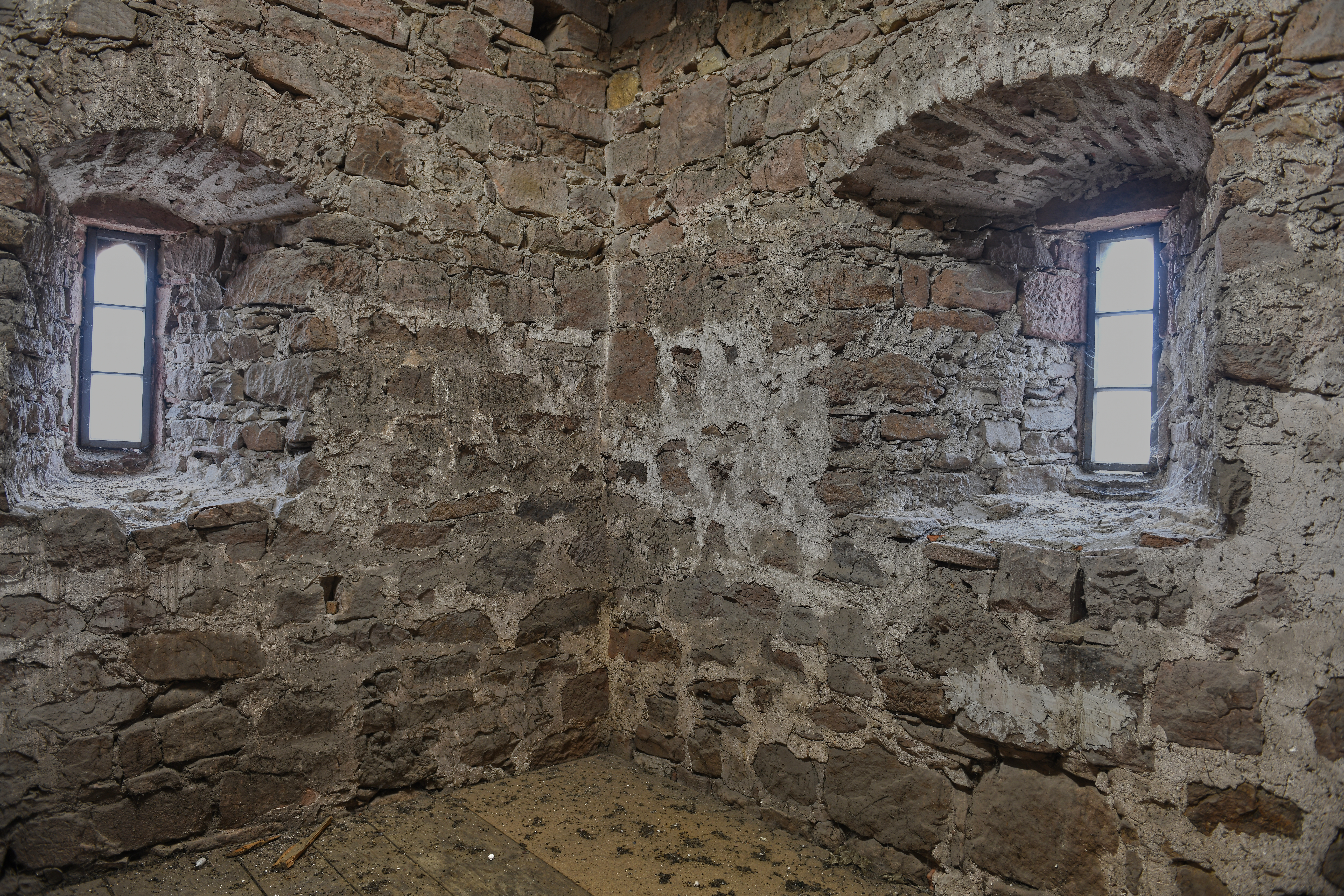 Hauinger Kirche: Turmbasis